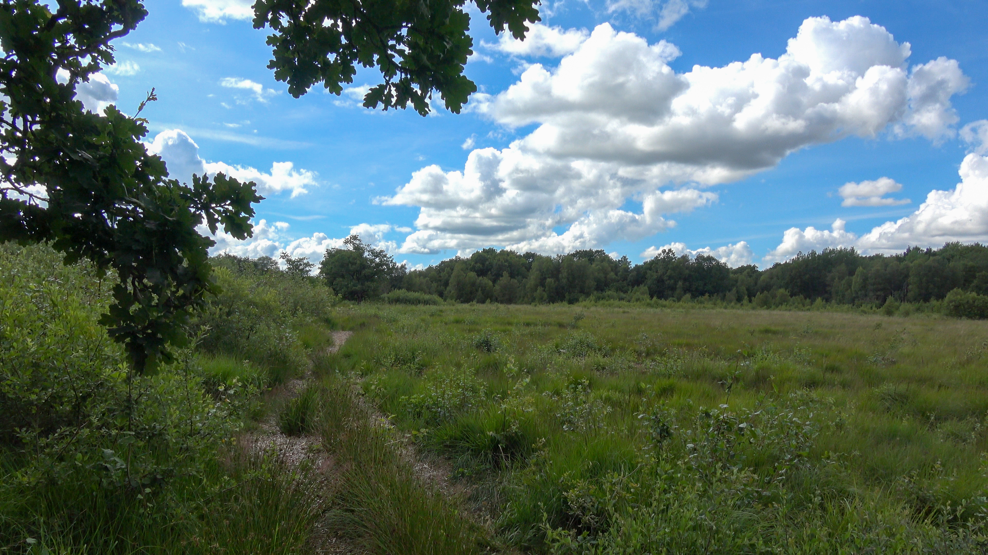 FFH-Gebiet Hechtmoor